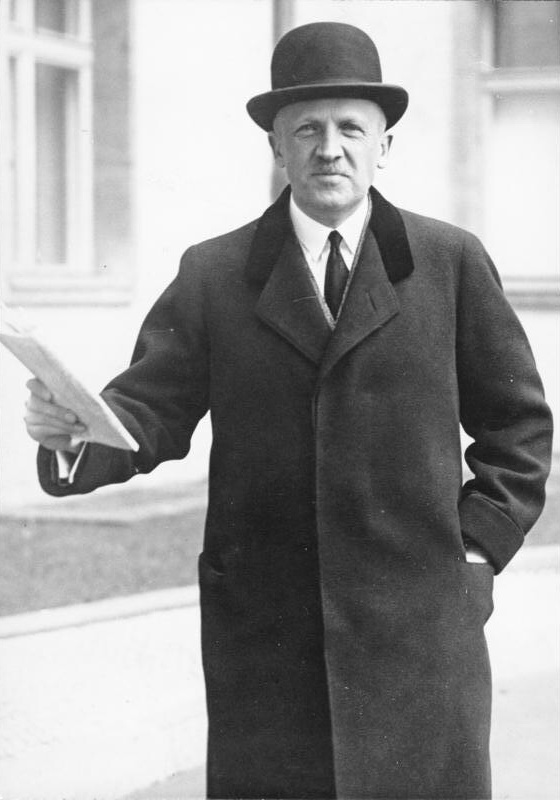 General von Schleicher, wurde vom Reichspräsidenten zum Reichskanzler ernannt! Der neue Reichskanzler General von Schleicher, verlässt nach seiner Ernennung das Reichspräsidenten Palais in der Wilhelmstraße.